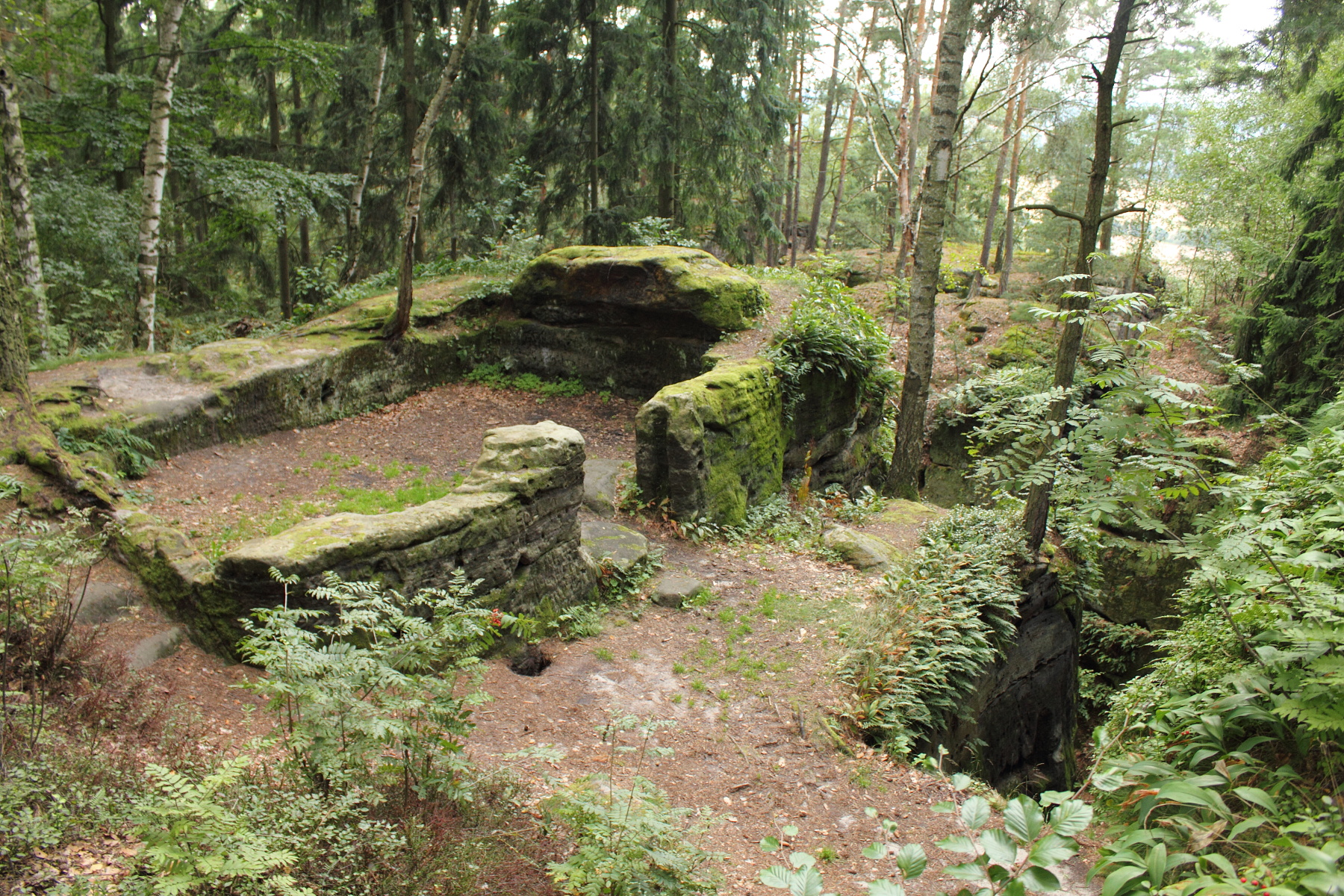 Chlum-Kozlov